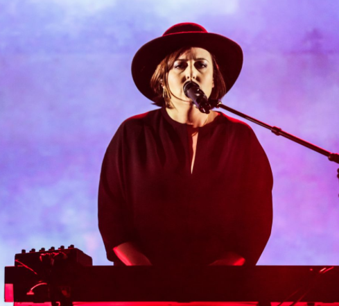 Lancement 22h22, nouvel album - 2015